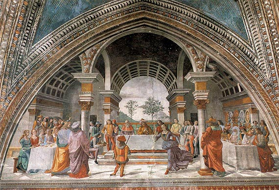 cappella tornabuoni frescoes in florence